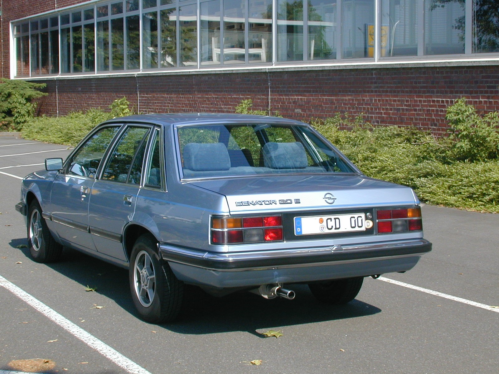 Opel Senator A1 3.0E CD 12/1978 hi.li.